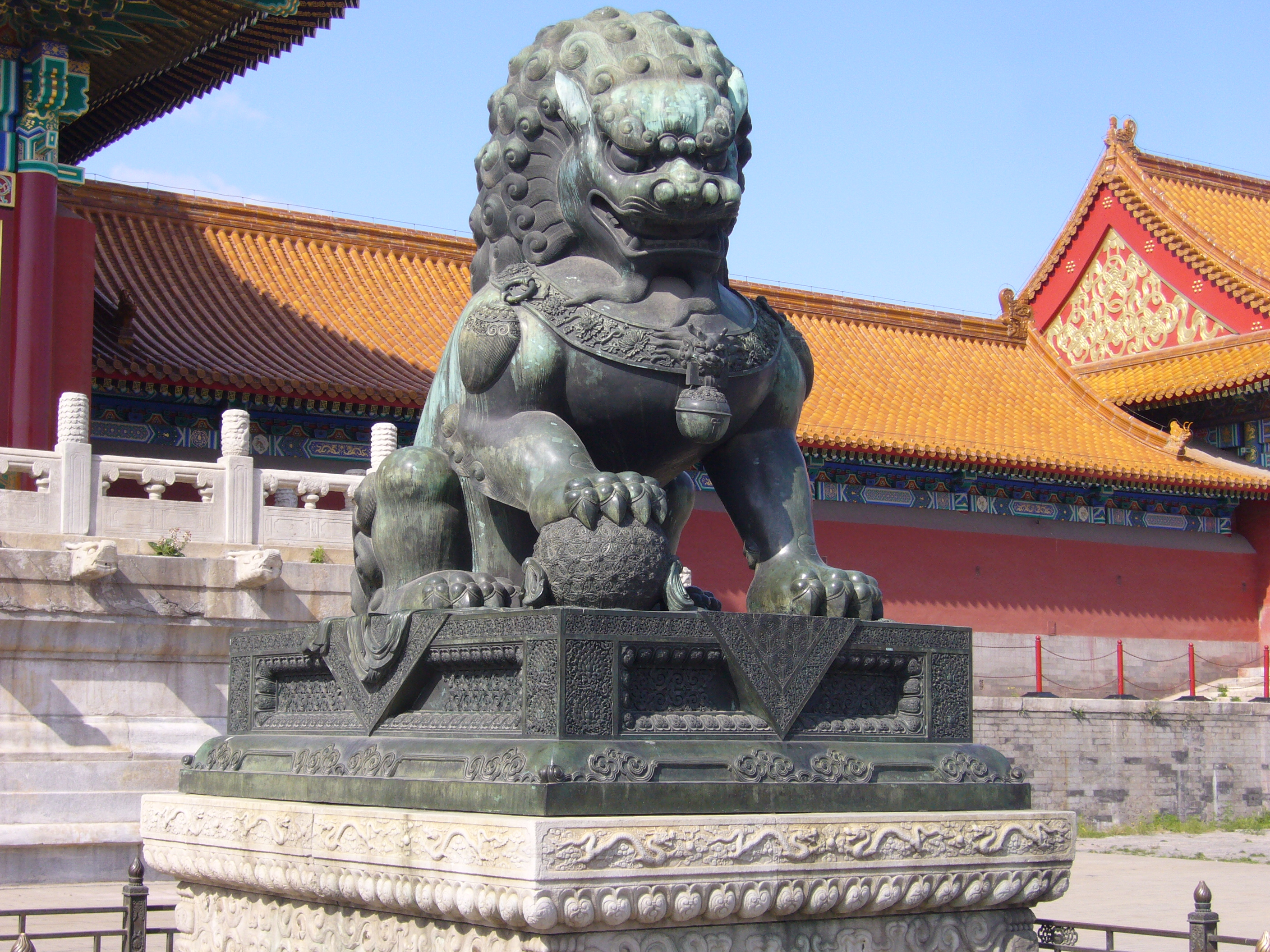 rechter tempelleeuw voor de tempel in de Verboden Stad in Beijing